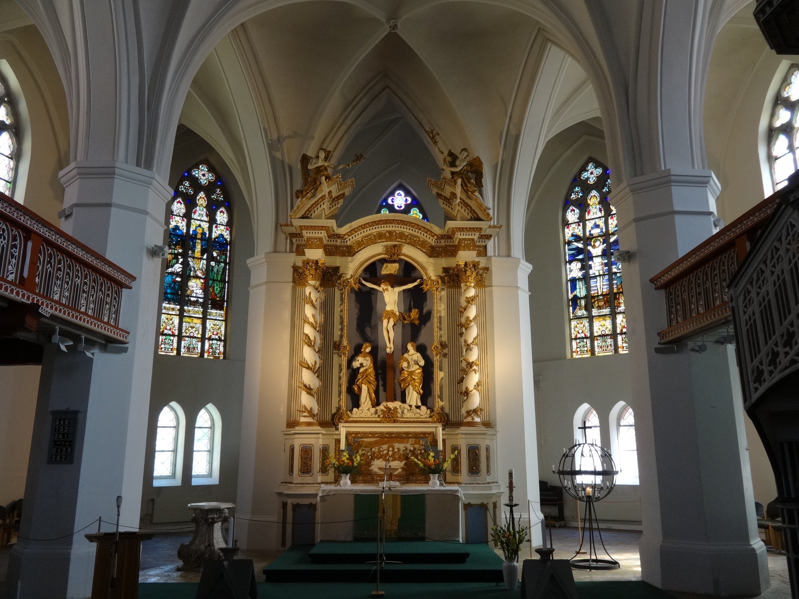 St. Jacobi, evangelische Stadtkirche in Nauen, Havelland, Brandenburg